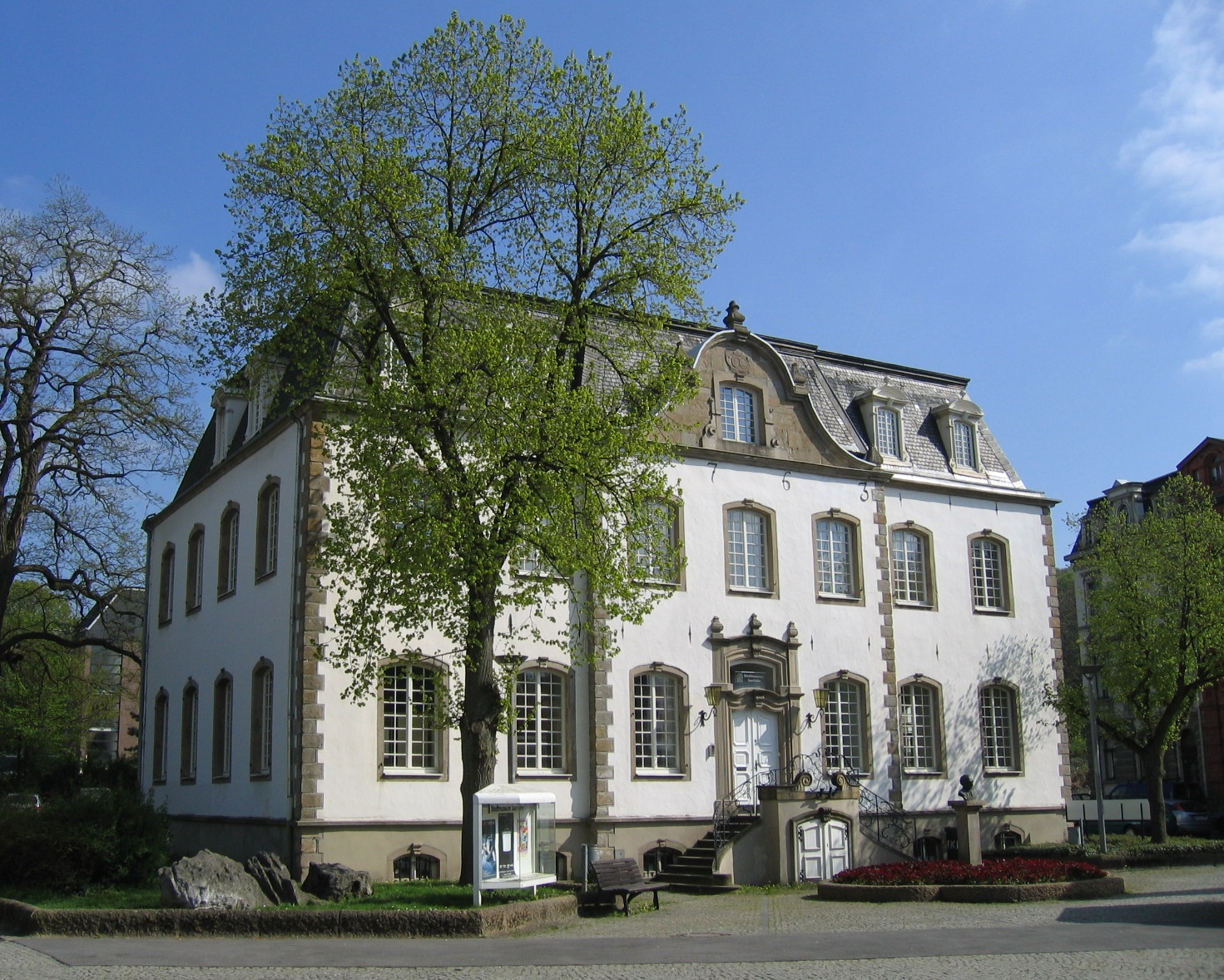 Stadtmuseum im „Haus der Heimat“ (erbaut um 1720) in Iserlohn.